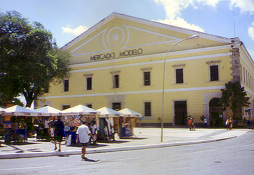 Mercado Modelo, cidade baixa, Salvador, Brasil